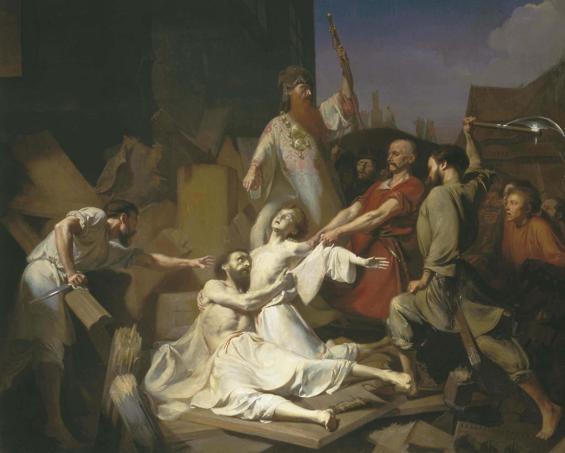 Первые мученики Церкви Русской, мчч. Феодор варяг и сын его Иоанн († 983).